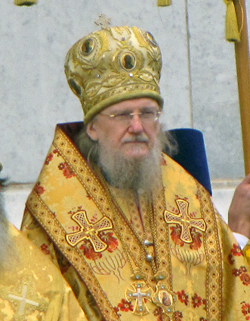 Схиепископ Сергий (Зализницкий) на праздновании 200-летия Отечественной войны 1812 года